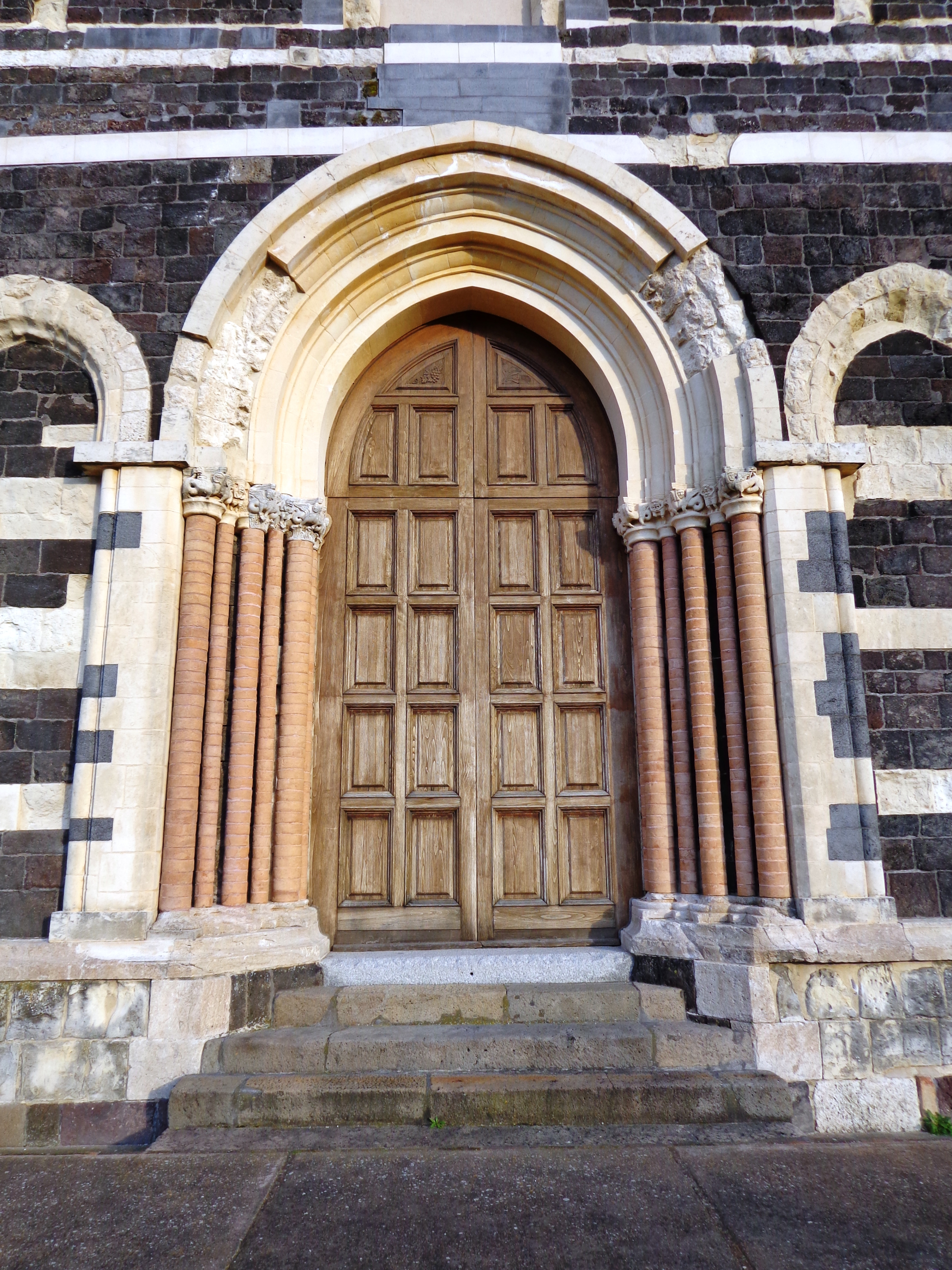 Cattedrale Patti 02